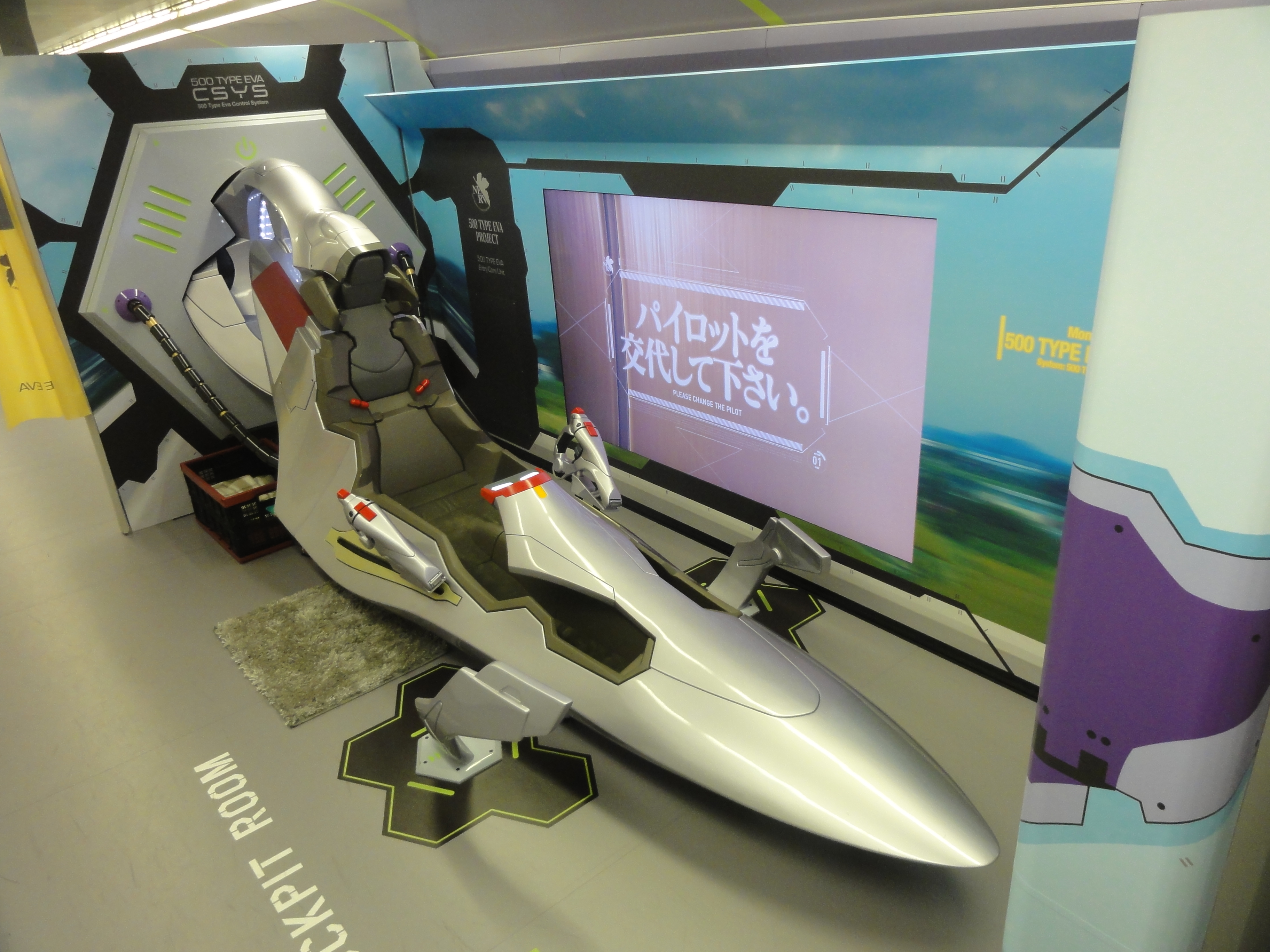 新幹線500系電車 Ｖ２編成 JR西日本「500 TYPE EVA」1号車内部 エヴァンゲリオンの実物大コックピット